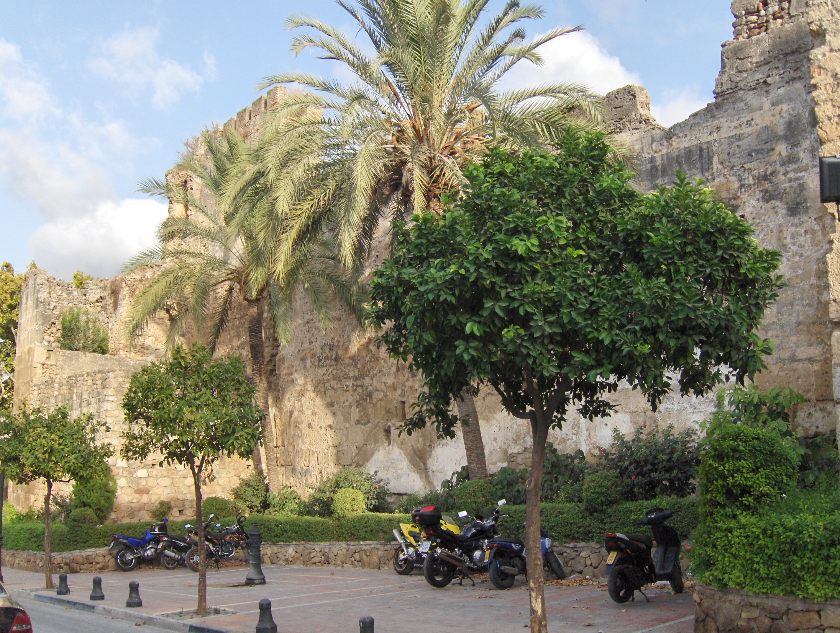 Muralla del castillo de Marbella, España.